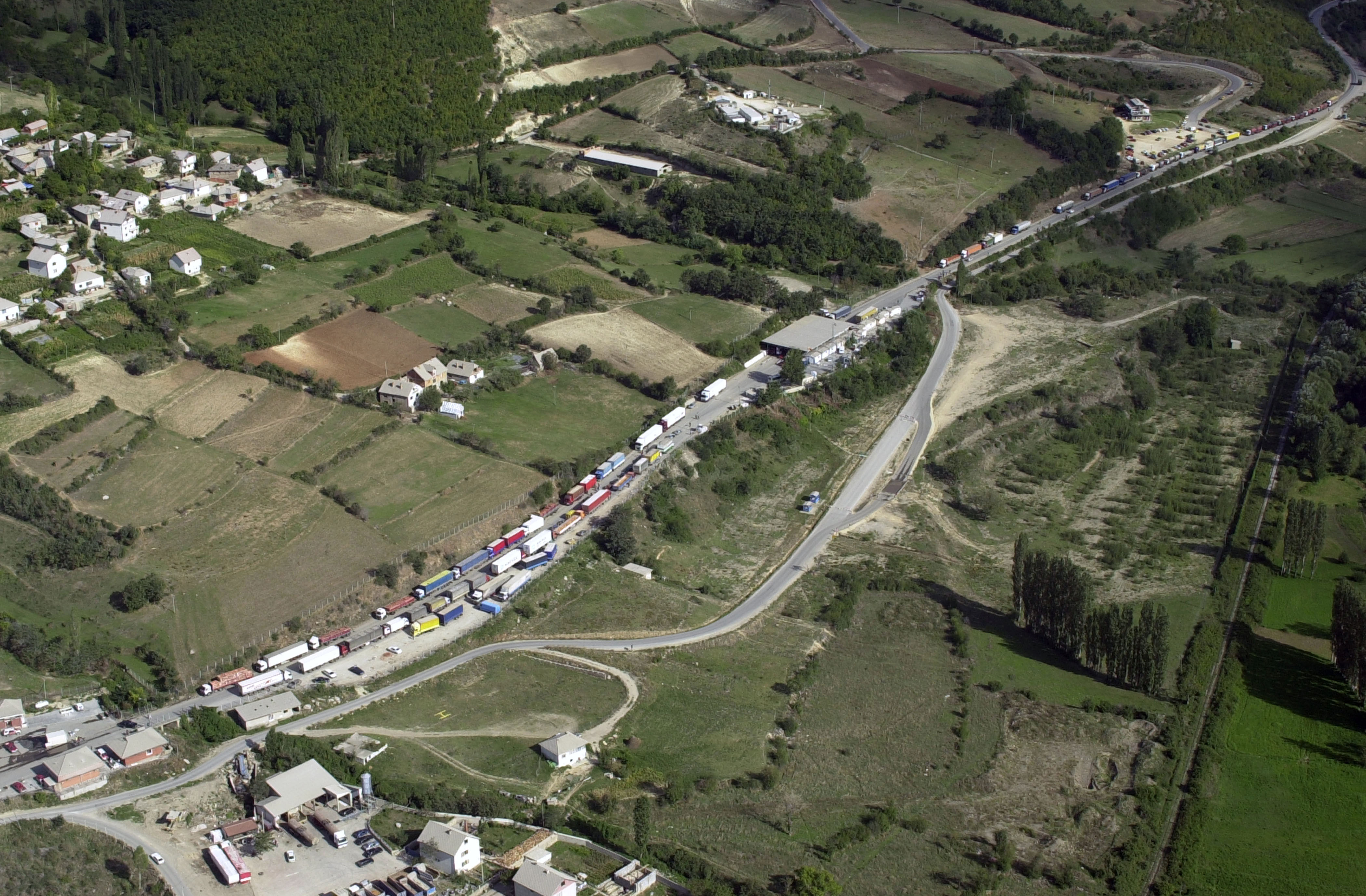 Aerial view on Đeneral Janković border pasage.